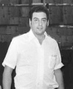 Diretor Técnico do Hospital Regional do Vale do Ribeira de 1957 a 1983